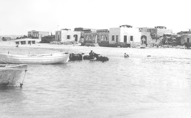 Al Tantura